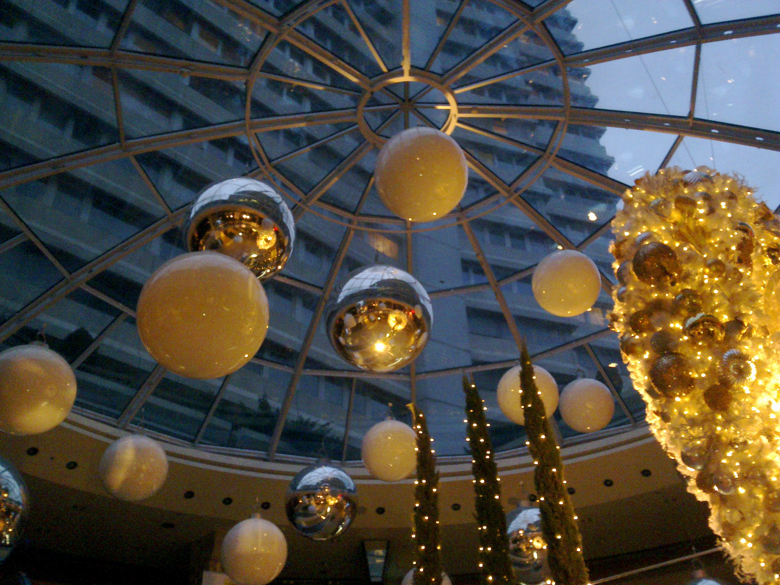 Weihnachtsbeleuchtung im Lentia City Komplex, Linz, Österreich